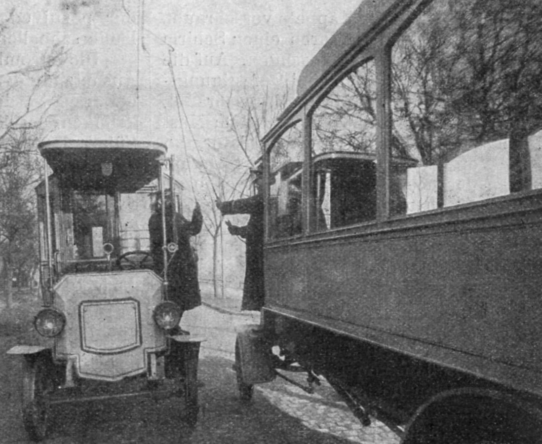 Begegnung zweier Oberleitungsbusse der Park- oder Arsterbahn in Bremen